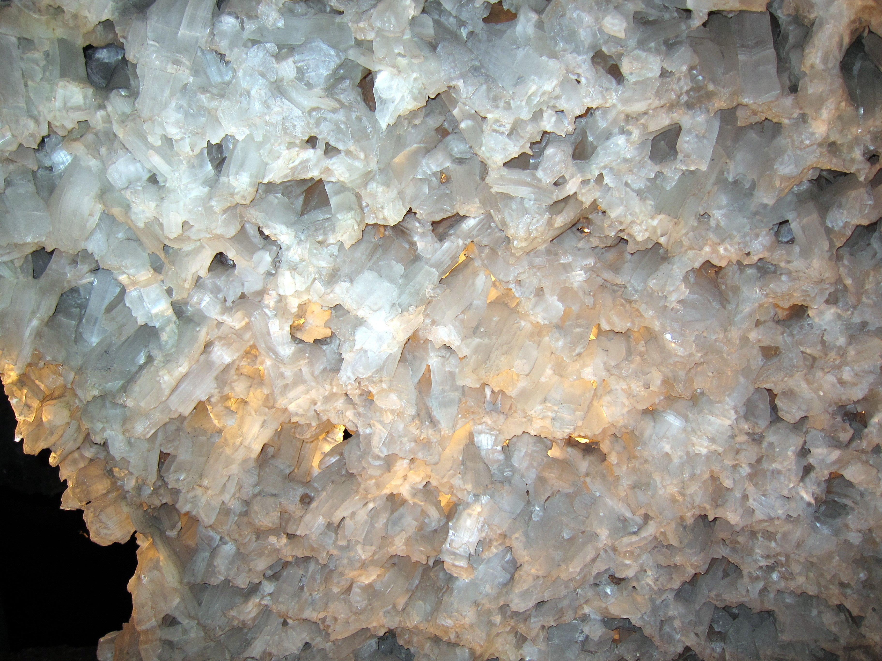 Marienglashöhle